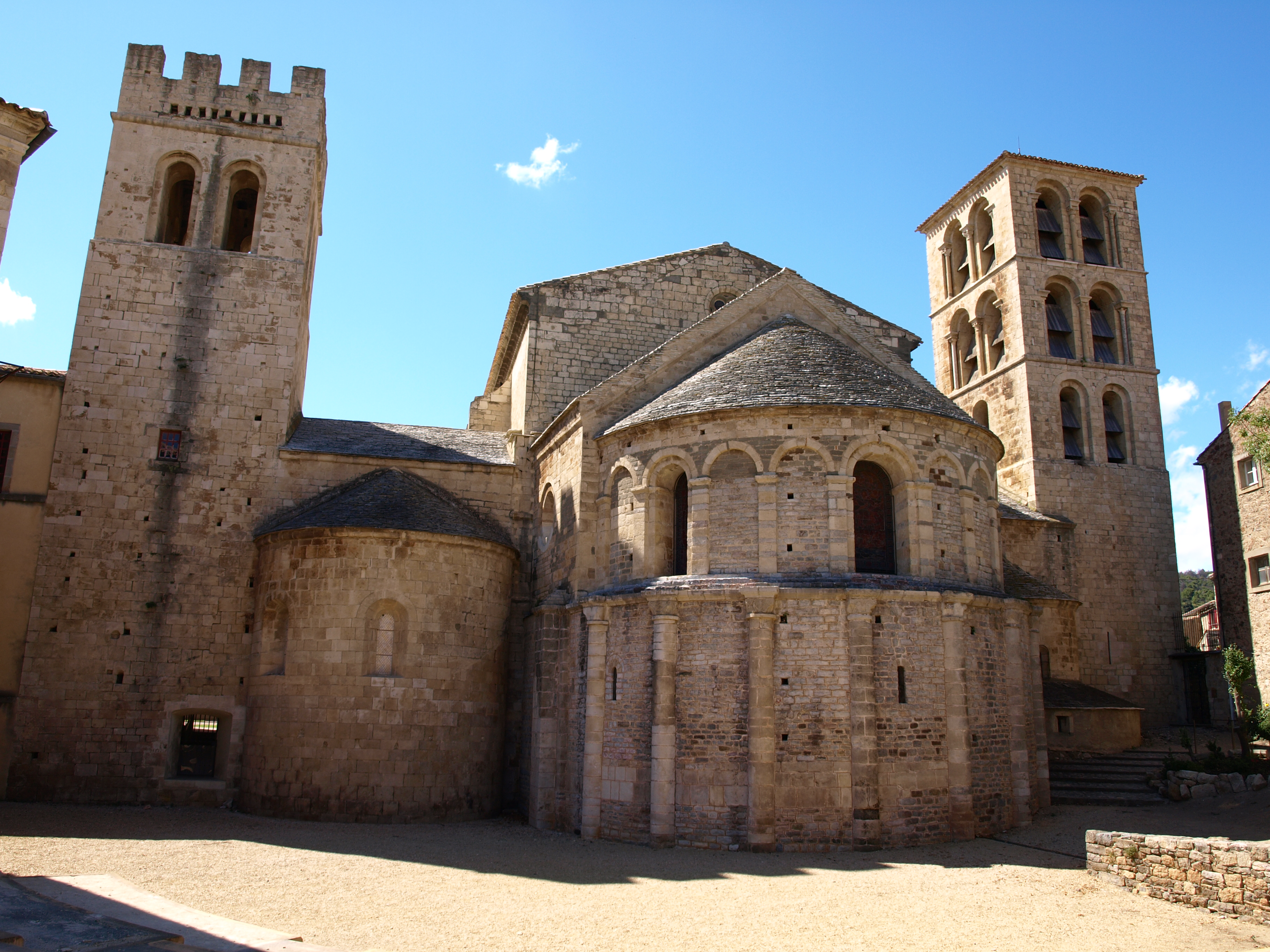 Caunes Minervois est une commune située dans le département de l'Aude